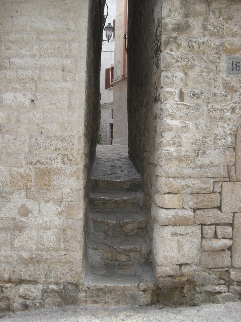 L'edificio scolastico Edmondo De Amicis